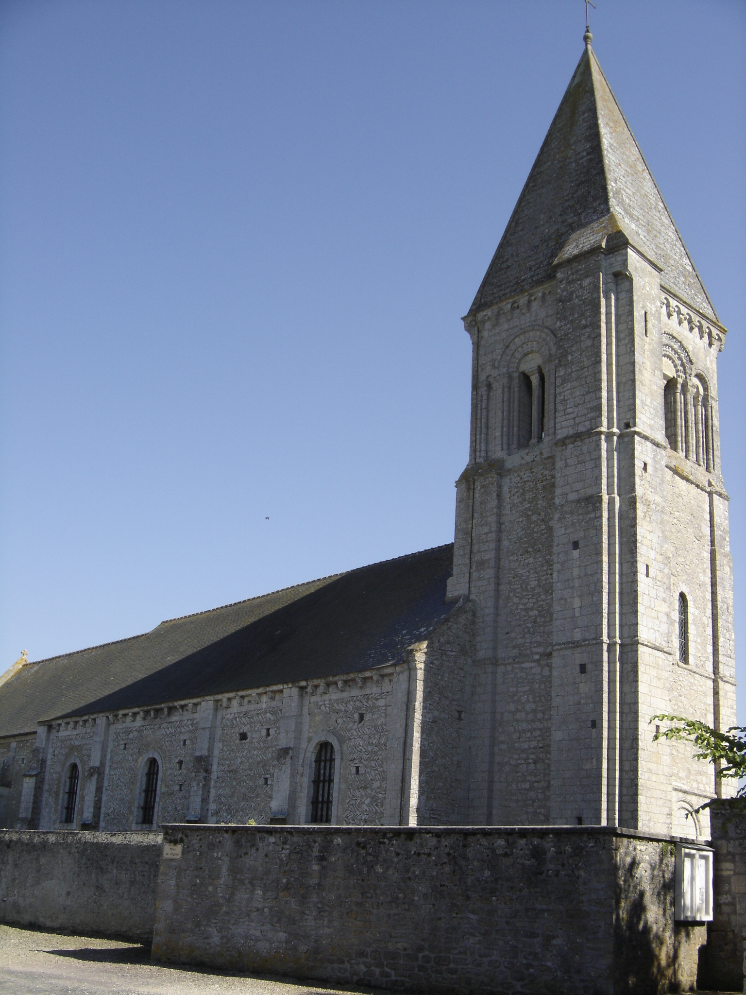 clocher-porche